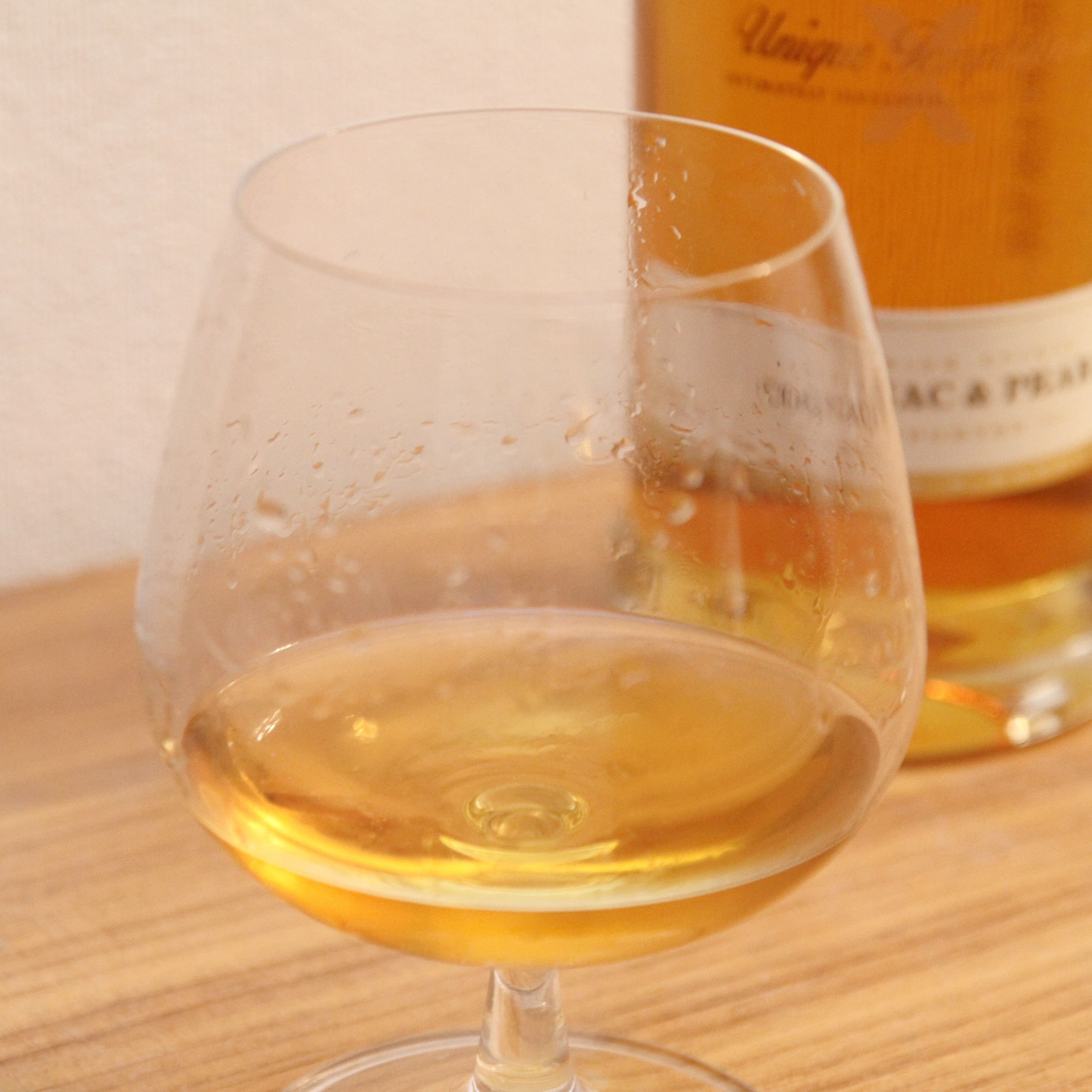 Xanté er en cognac-basert pærelikør.